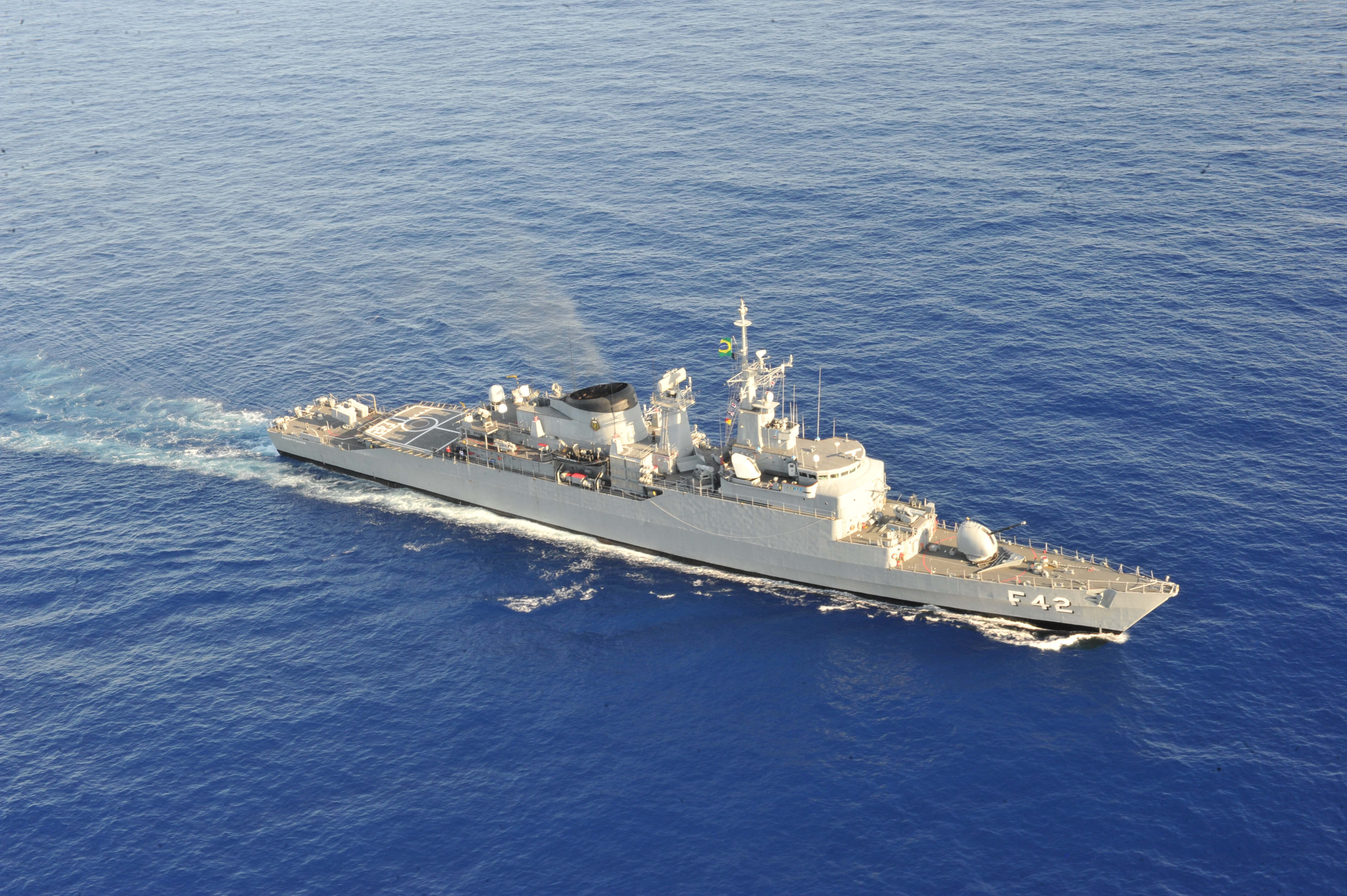 Arquivo liberado pela Marinha do Brasil através de projeto GLAM com Wiki Educação Brasil